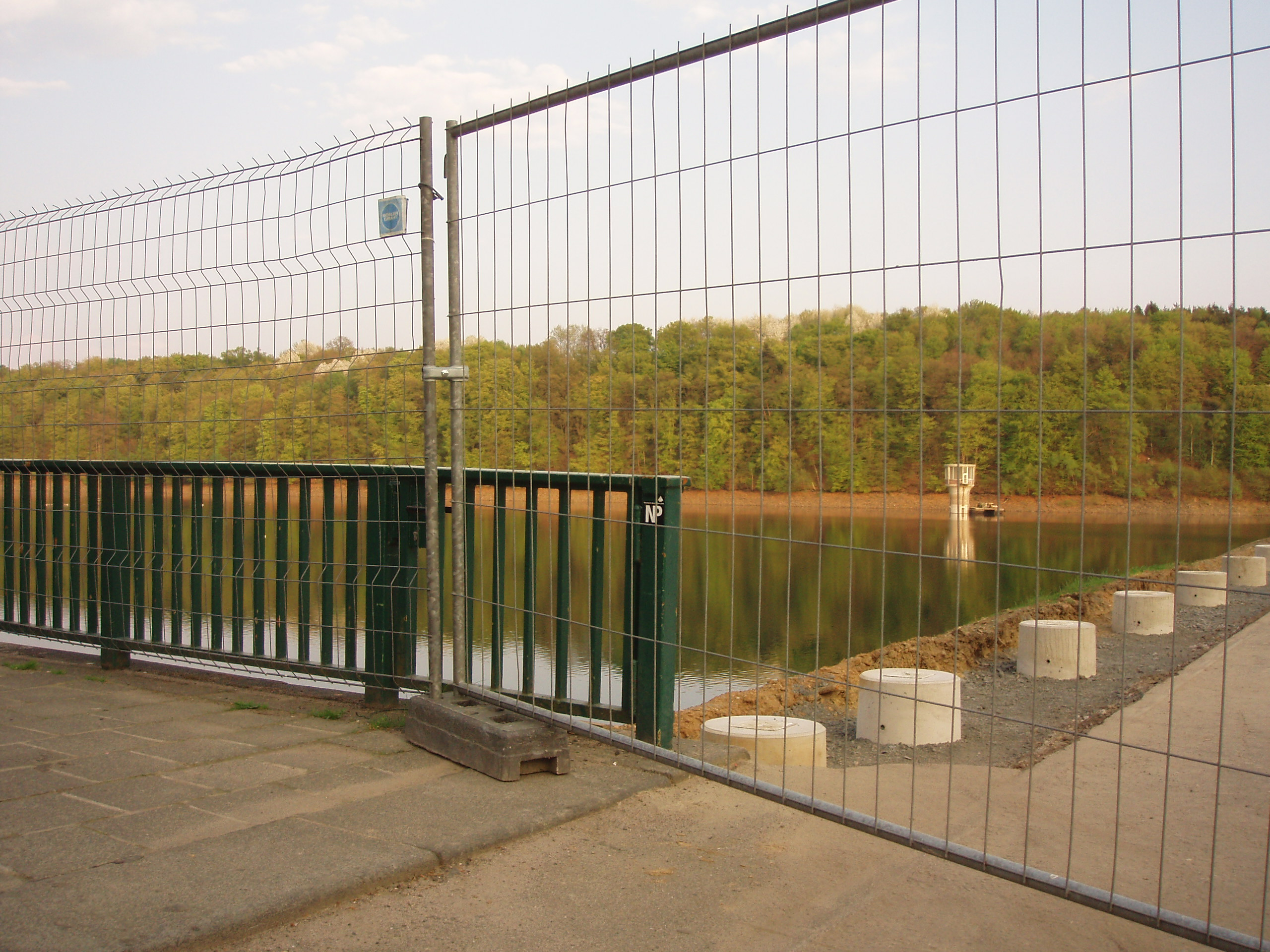 Absperrung während der Renovierungsarbeiten